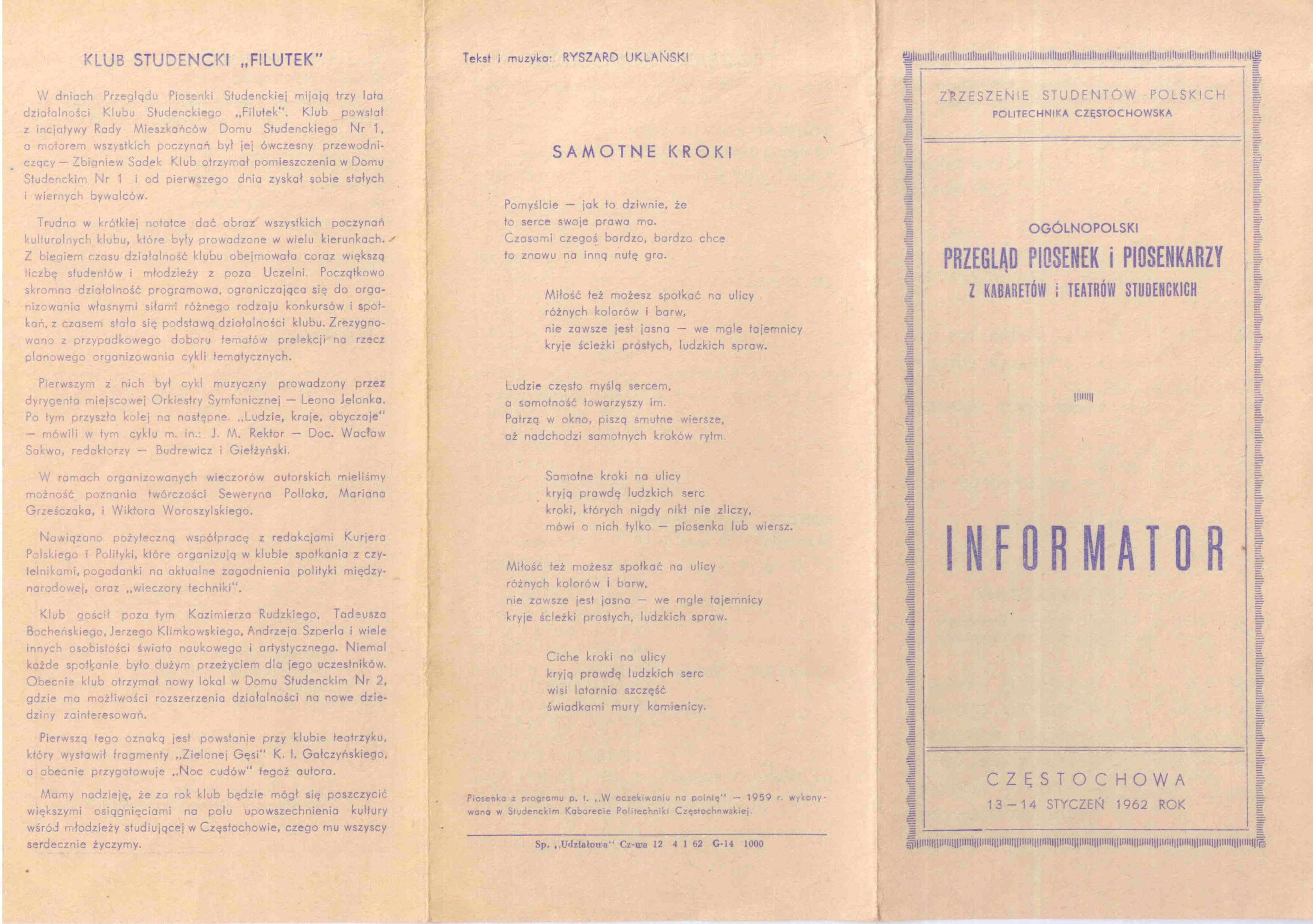 Informator o imprezie rozdawany wszystkim widzom, wydrukowany w nakładzie 1000 egz.